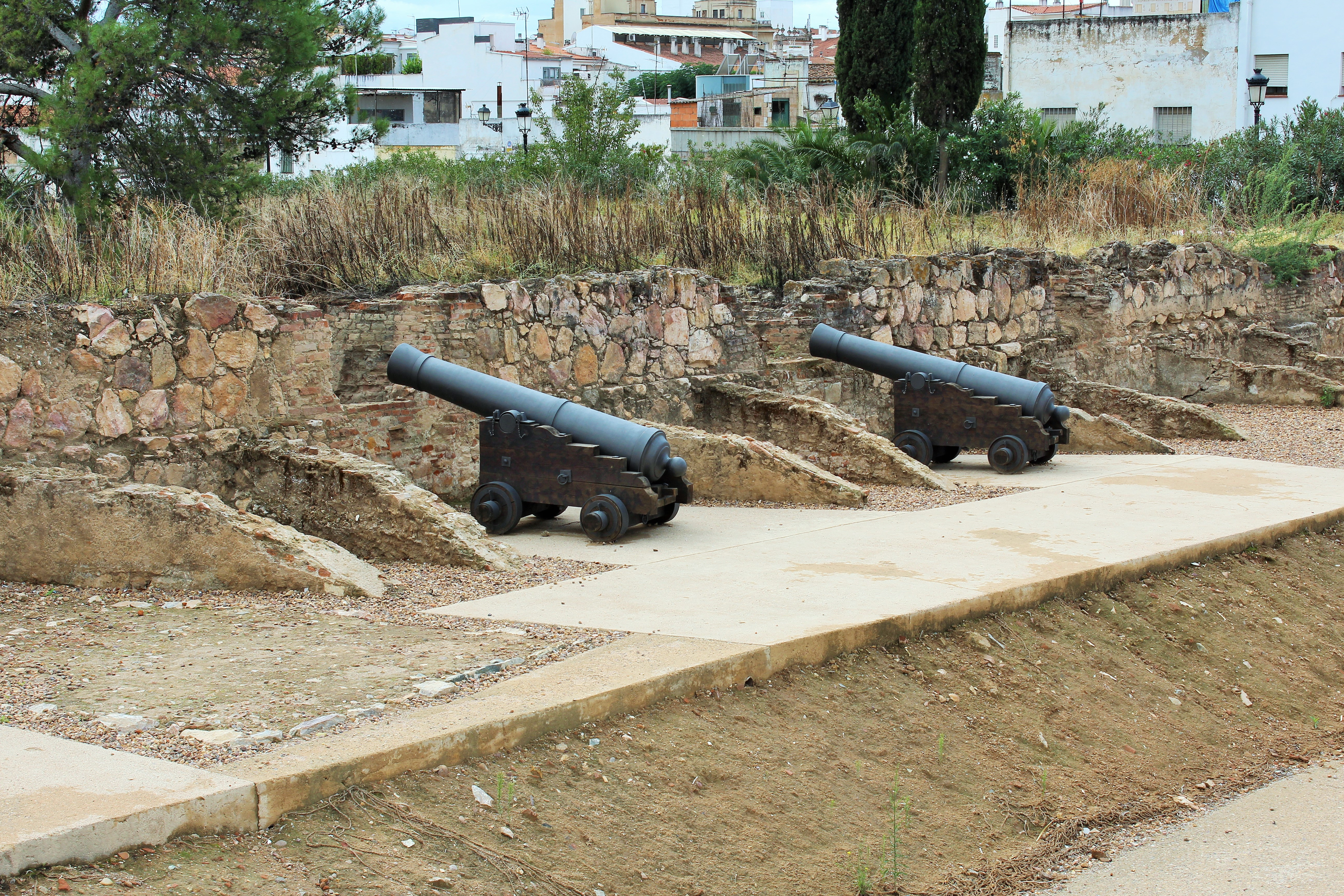 Disposición de cañones en troneras.